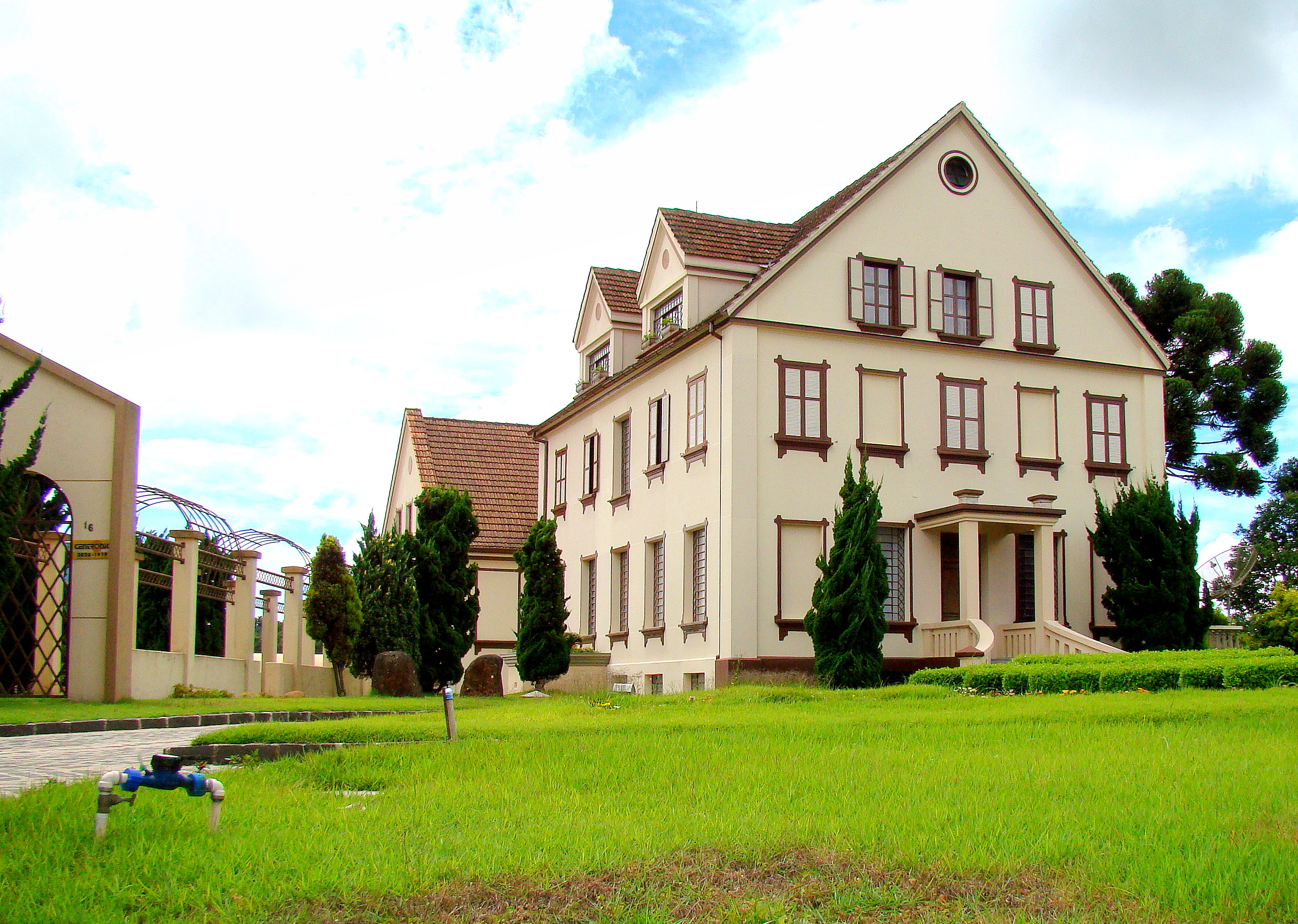 Casa das Irmãs Passionistas em Colombo (município da Grande Curitiba), Paraná, Sul do Brasil.